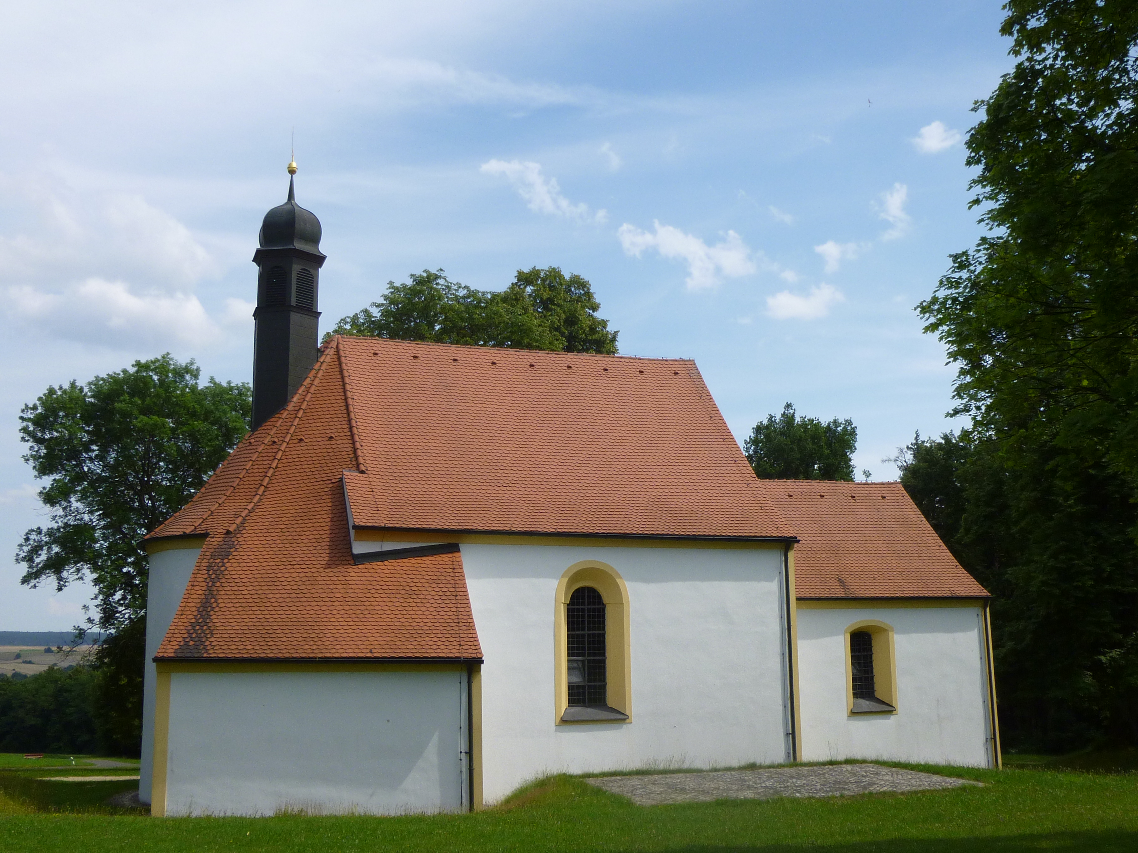 Wallfahrtskirche 14 Nothelfer Eggenberg/Ensdorf